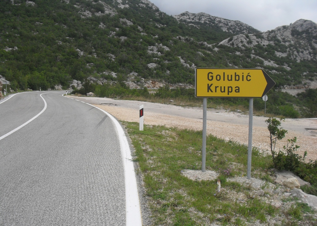 Велебит; скретање за села Голубић и Крупу из правца Обровца, Далмација.